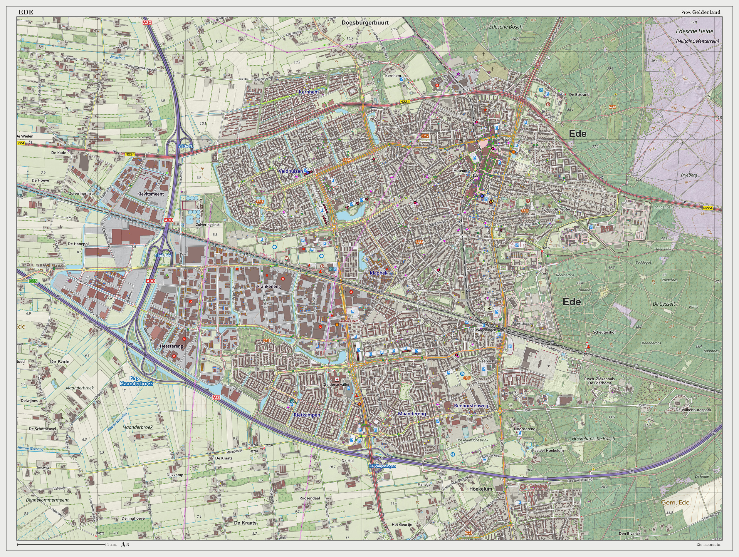 Topografische kaart van Ede (woonplaats). Resolutie: 300 pixels/km. Kaartbeeld samengesteld uit de open geodata van de Top10NL en Top25namen (Basisregistratie Topografie, Kadaster), Creative Commons BY licentie. Gebouwvlakken uit open geodata BAG extract. Wegen uit de OpenStreetMap, OpenStreetMap community. Reliëfschaduw uit de Actuele Hoogtekaart AHN2. Samenstelling en kleurenschema: Jan-Willem van Aalst, met QGIS2. Zie ook de Legenda.